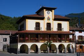 La biblioteca de Roncal en el Ayuntamiento de Roncal, en Navarra